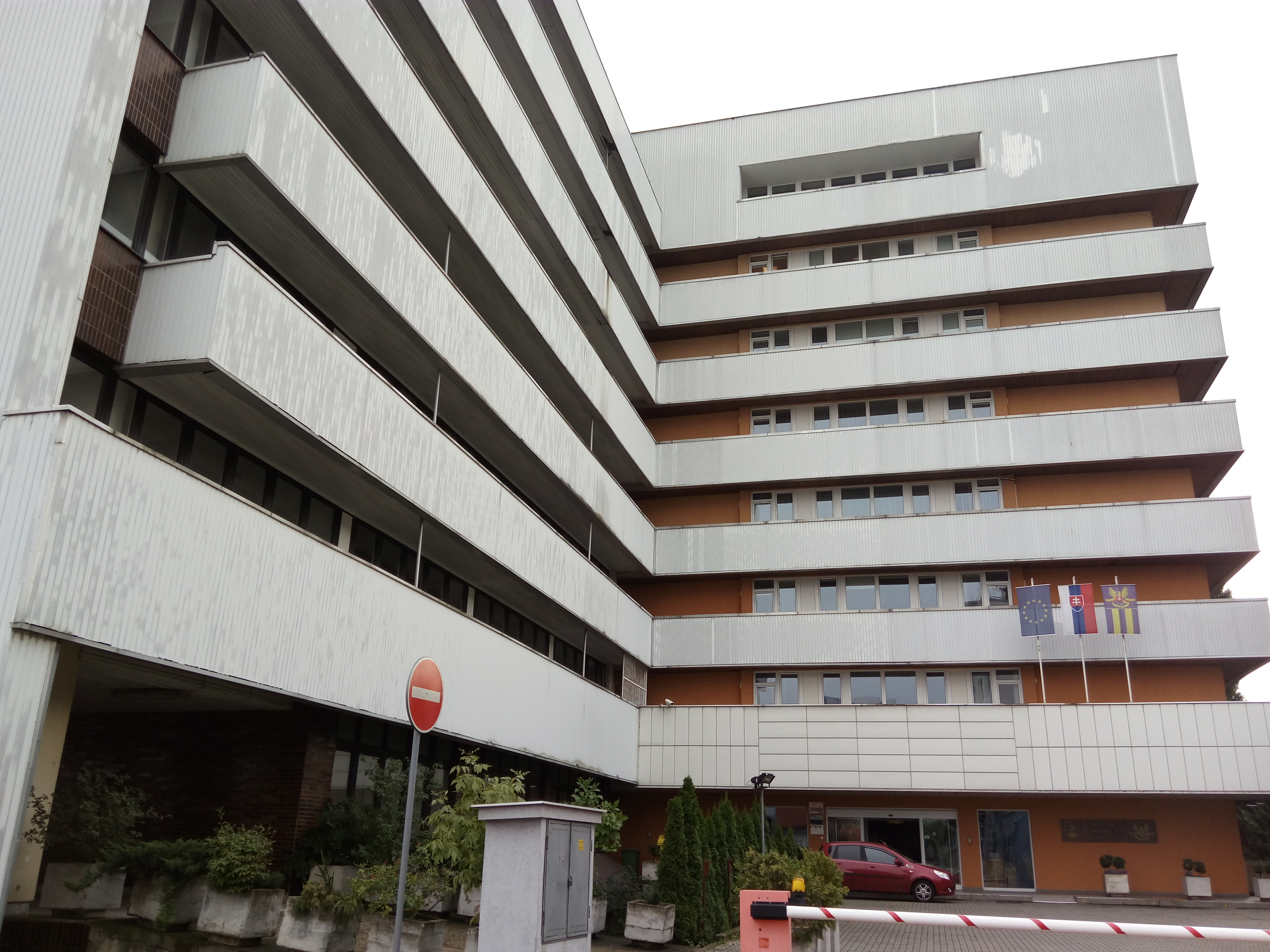 Priemyselná, Ružinov, Bratislava